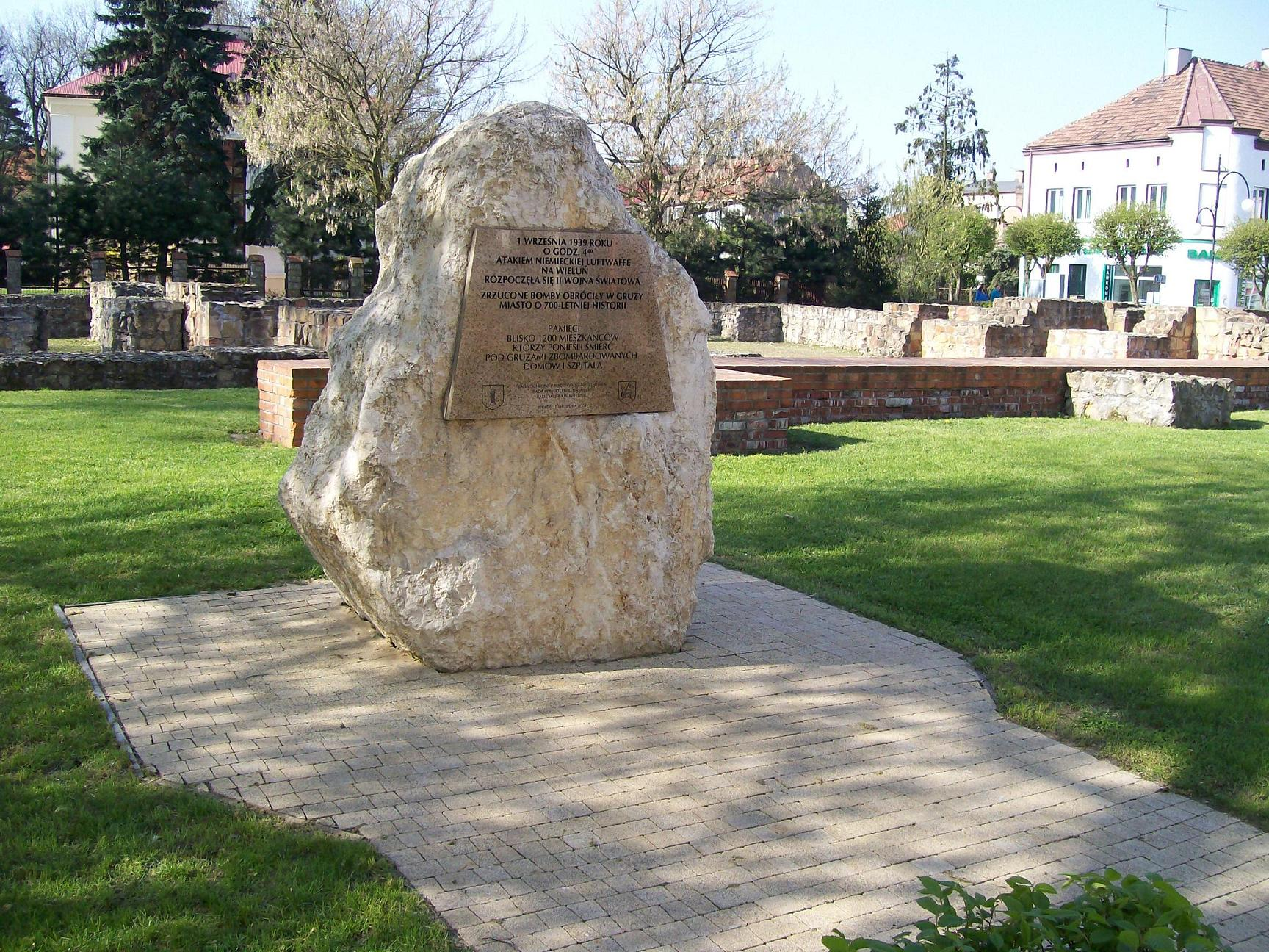 Tablica upamiętniająca bombardowanie miasta w 1939 roku - odsłonięta przez prezydenta Aleksandra Kwaśniewskiego w 2004 roku. W tle ruiny pierwszej kolegiaty.